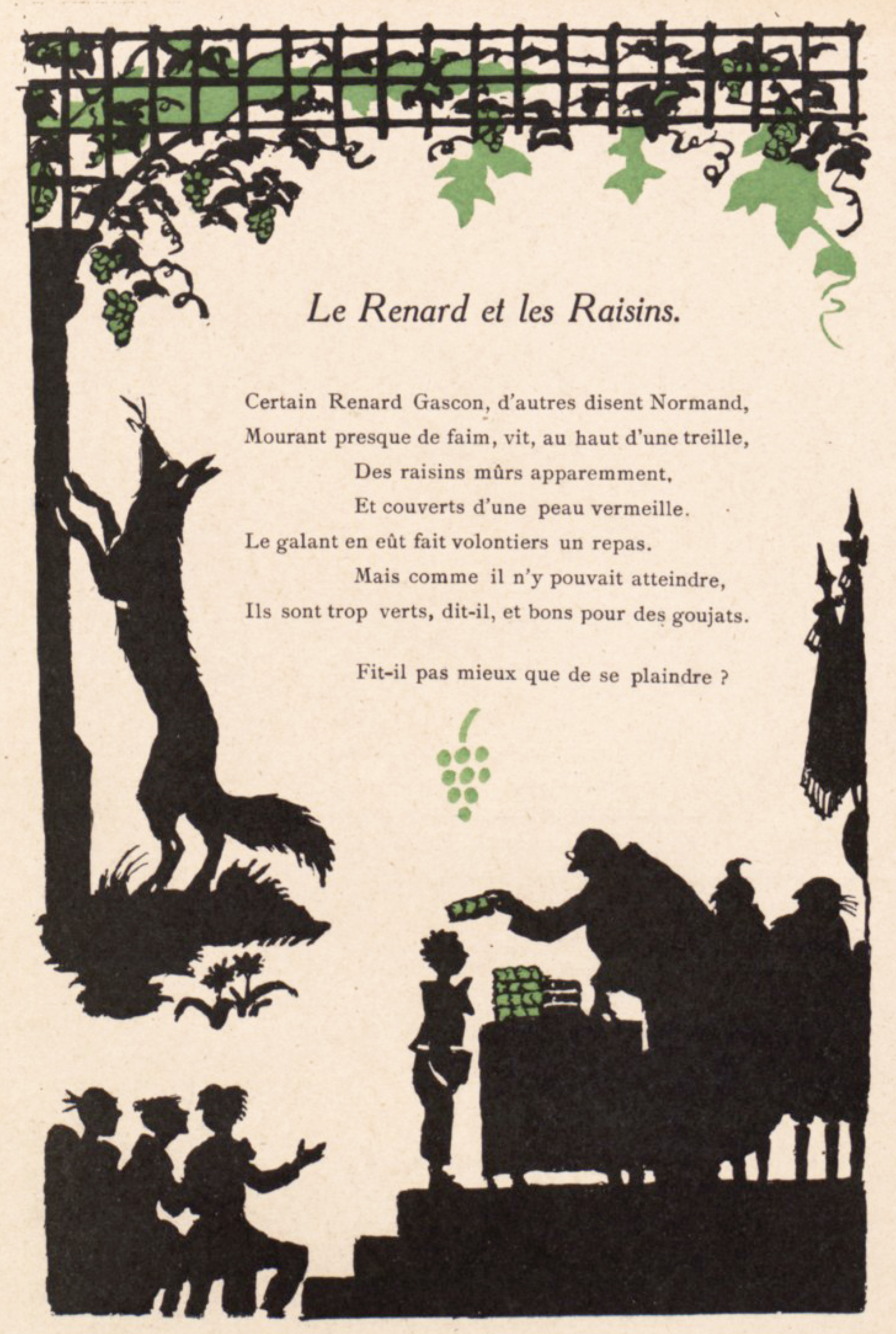 Dessin réalisé par Henri Avelot représentant la fable Le Renard et les raisins de Jean de La Fontaine et extraite du livre " Dix fables d'animaux, illustrations en silhouettes humoristiques aux dépens des humains " (Paris, édition Henri Laurens, 1932).